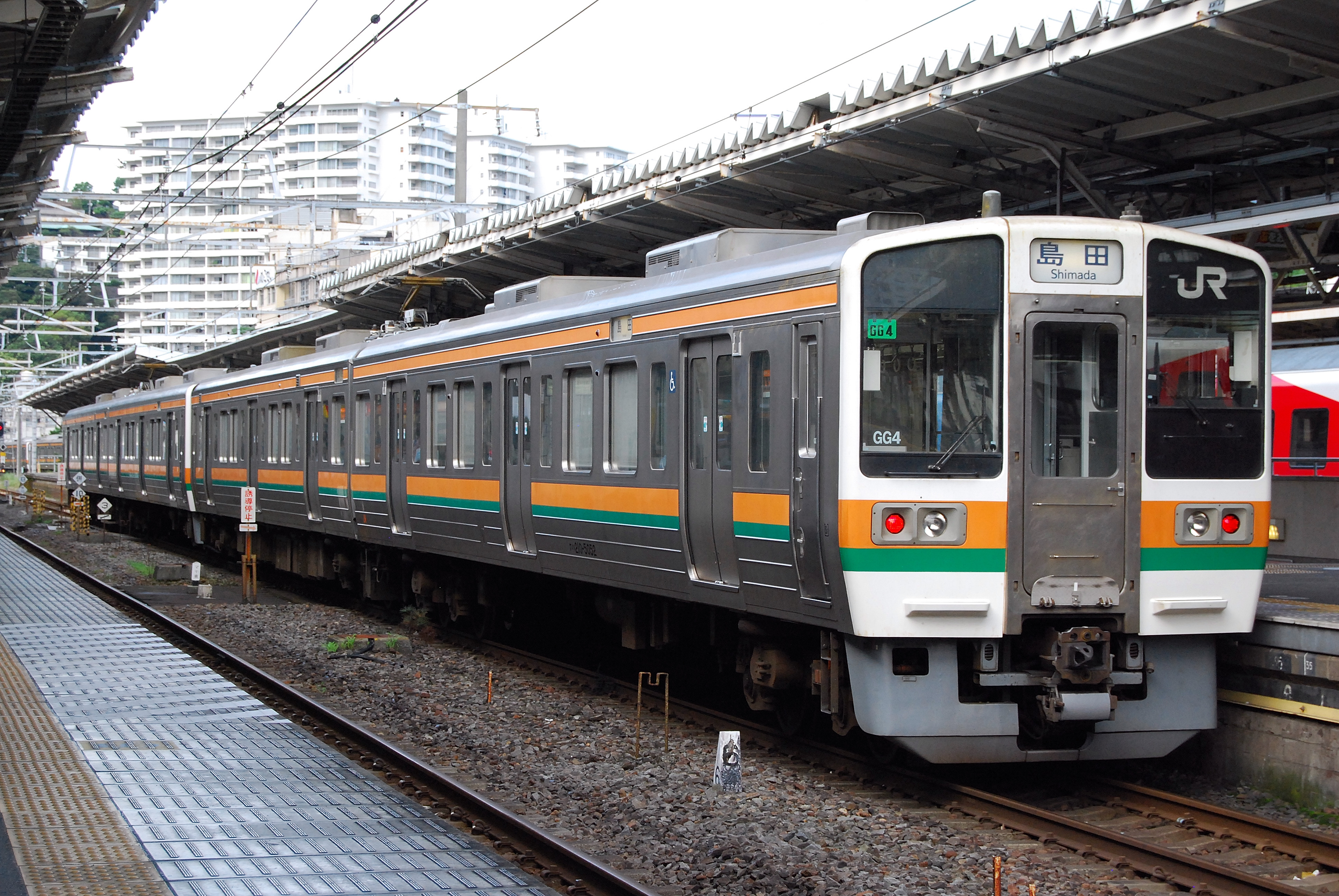 211系5000番台（熱海駅）